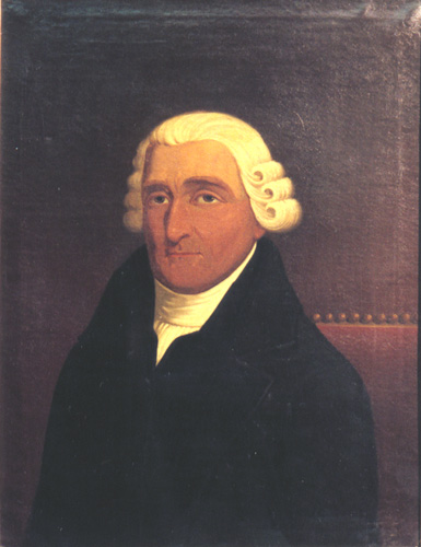 Joseph-François Perreault (1753 à Québec - 1844) est un politicien québécois. En 1796, il s'implique dans la vie politique et est élu député du Comté de Huntingdon à la Chambre d'assemblée du Bas-Canada.